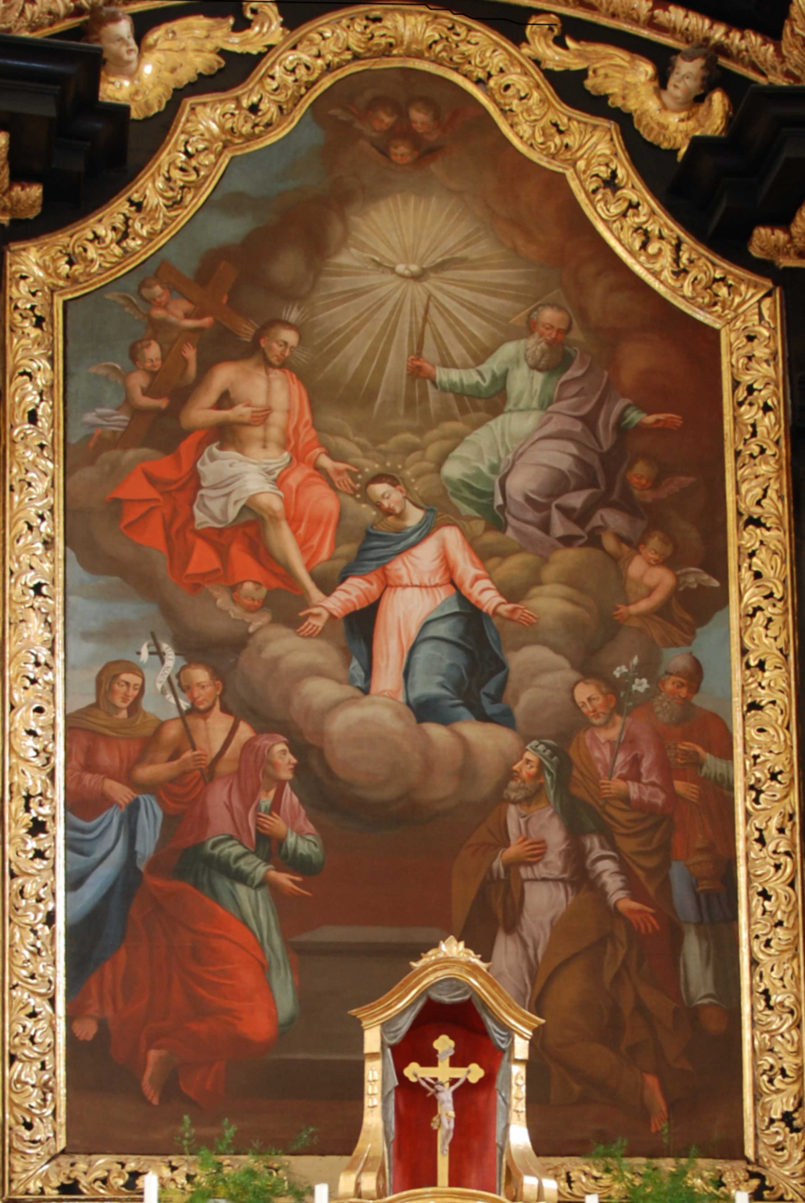 Altarblatt- Hochaltar "Krönung Mariens durch die Heiligste Dreifaltigkeit" von Franz Ignaz Bendl (Pendl)Passau 1686